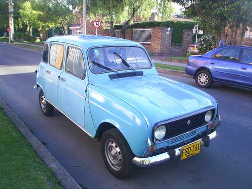 Renault 4 Plus 25 Mod. 1980 Made in Colombia.